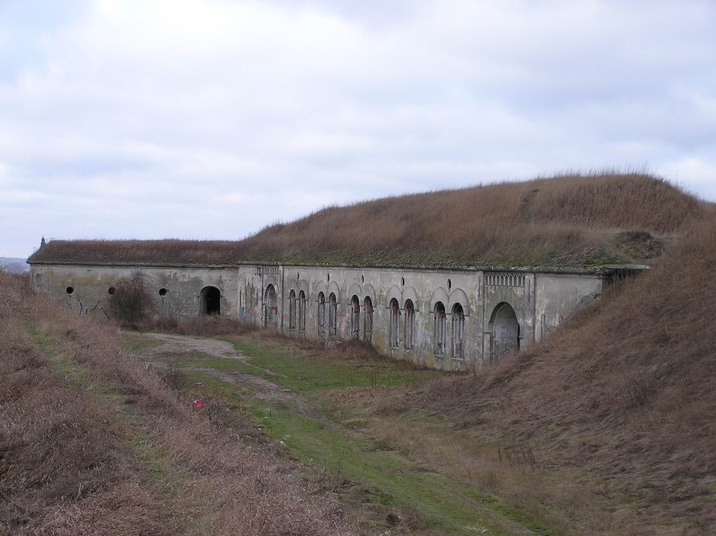 Piątnica - Przedmoście Piątnica (dec. zespół fortów), w zespole Twierdzy Łomża